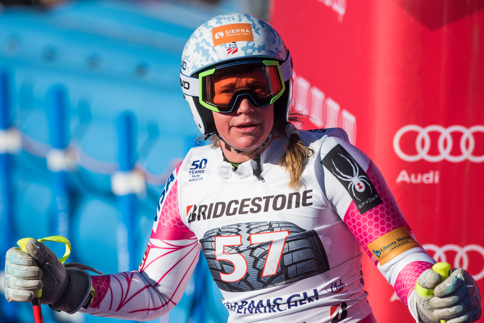 64. Kandahar Rennen,Alice McKennis,Audi FIS Ski Weltcup Garmisch-Partenkirchen,Damen Super-G,Kandahar,Ladies Super-G